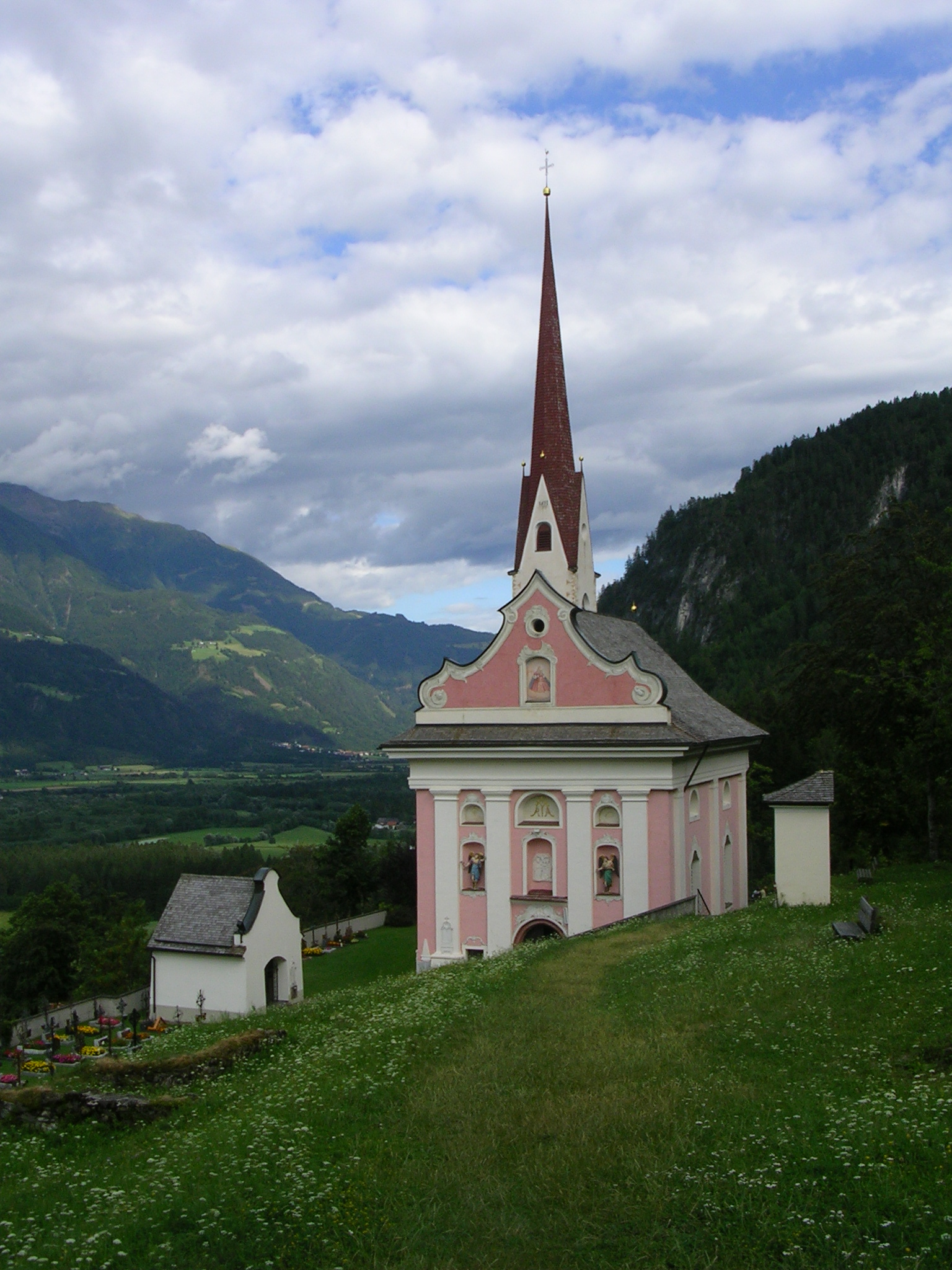 Lavant - Pfarrkirche Heiliger Ulrich